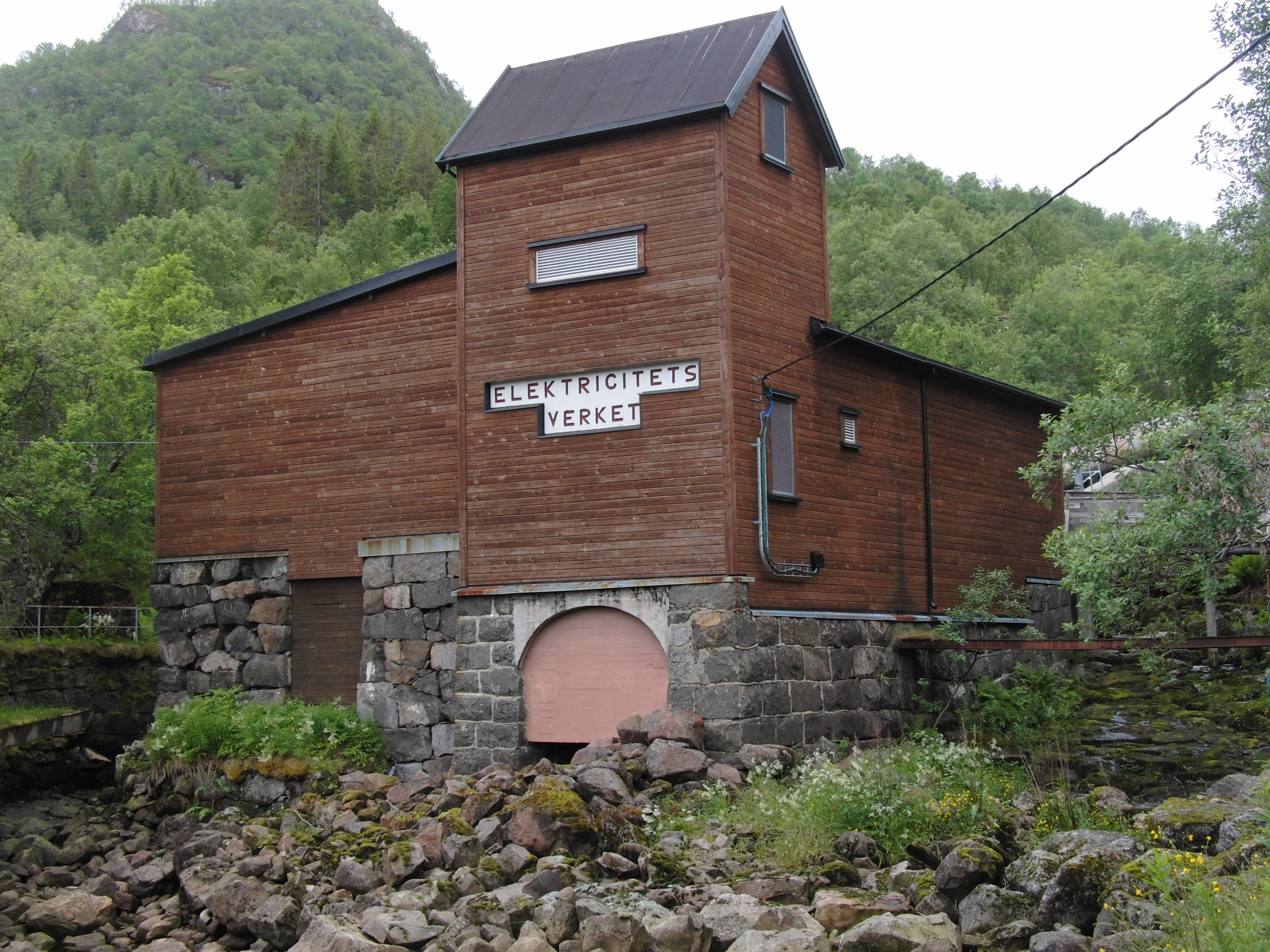 Leirfossen kraftverk